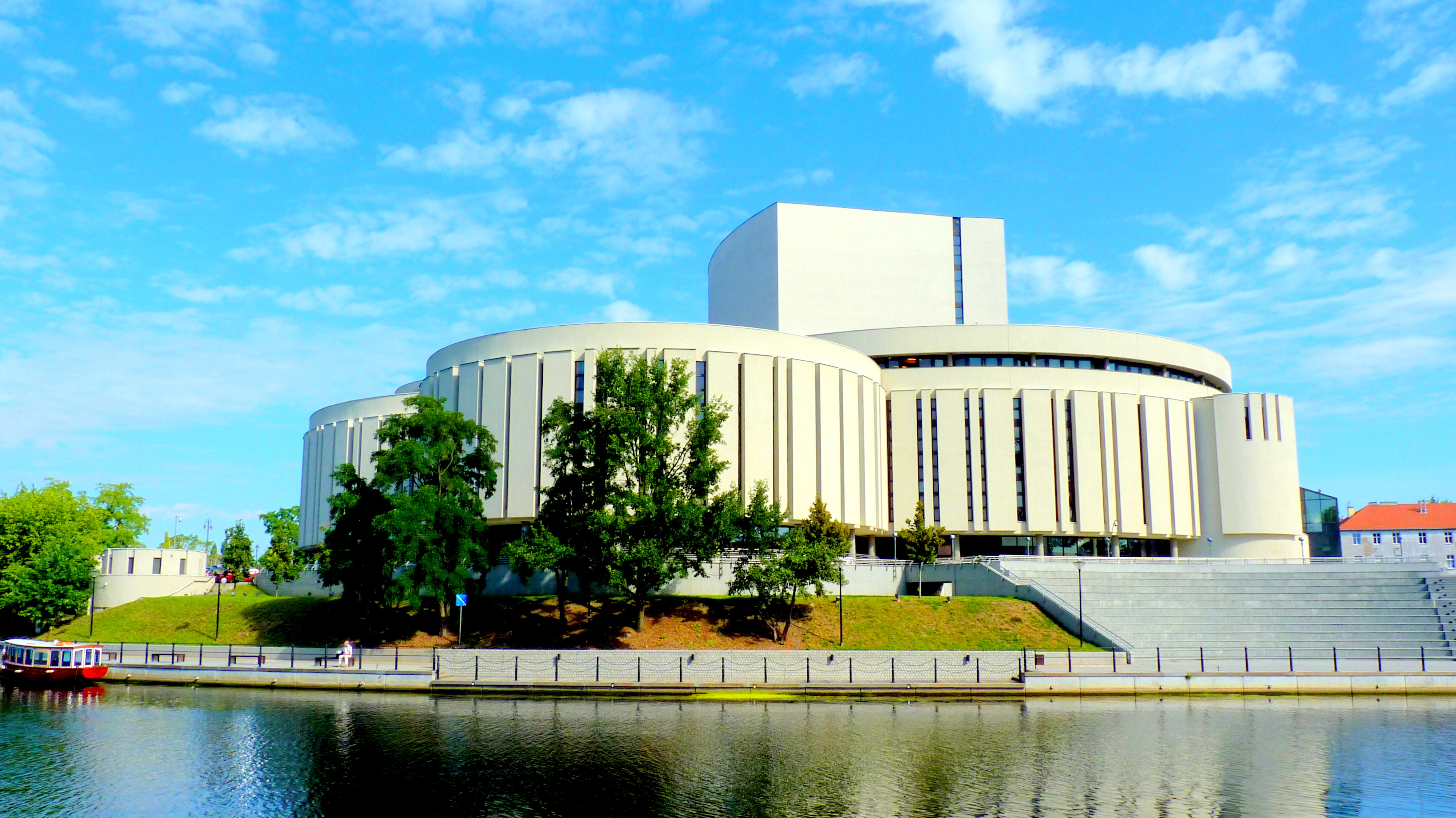 2012 .O8 .29 - Opera Nowa - widok z wyspy młyńskiej